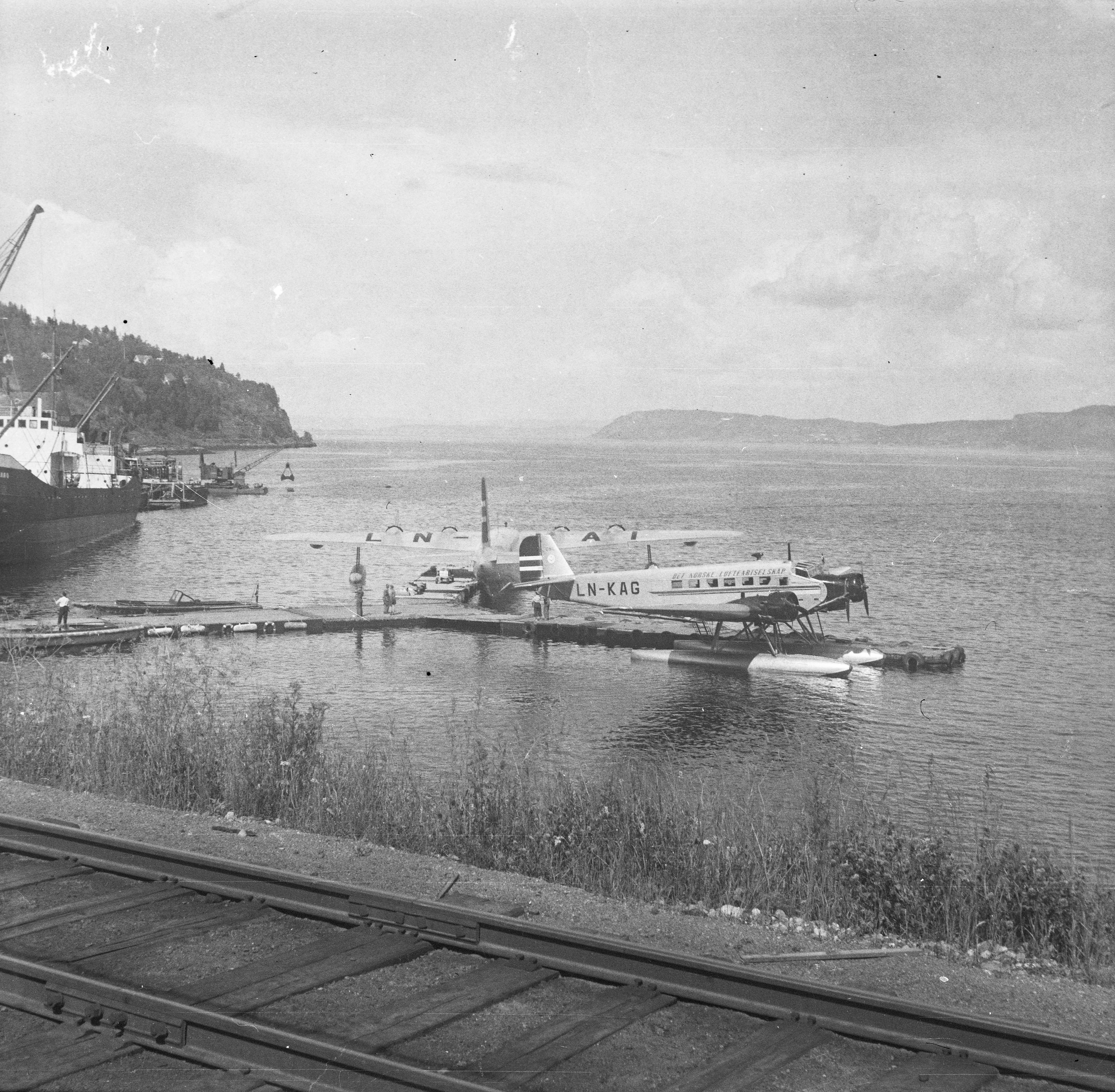 Format: 120 mm sort/hvitt negativ Dato / Date: mellom 1945 - 1952 Fotograf / Photographer: Eirik Sundvor (1902 - 1992) Sted / Place: Hommelvik, Malvik Google Street View: goo.gl/maps/wlik9 Wikipedia: Det Norske Luftfartselskap Eier / Owner Institution: Trondheim byarkiv, The Municipal Archives of Trondheim Arkivreferanse / Archive reference: Tor.H43.B78.F18307 Merknad: På bildet sees Det Norske Luftfartselskaps sjøfly LN-KAG "Jutulen" (Short Sandringham) og LN-LAI "Veslefrikk" (Junkers Ju 52).